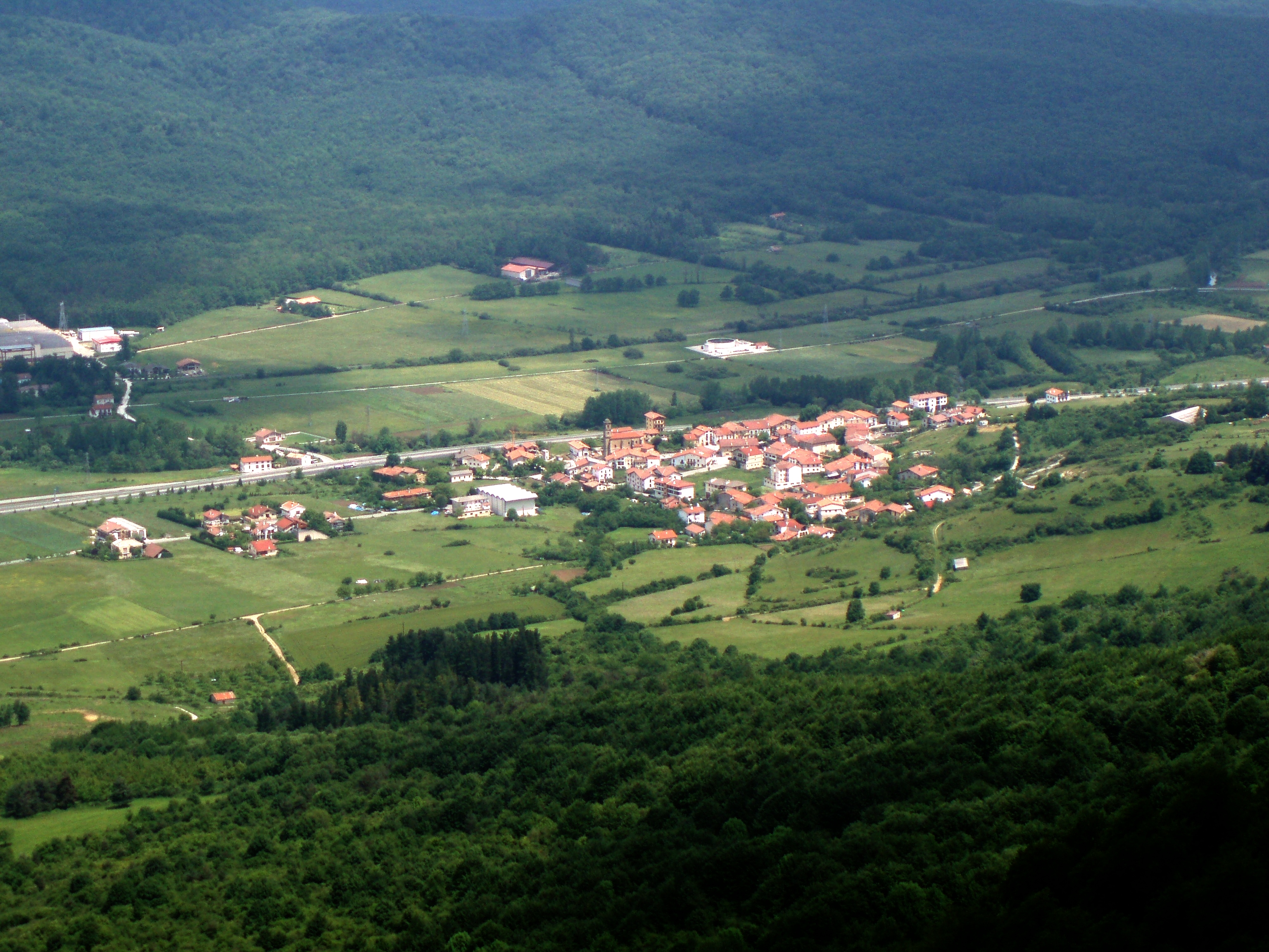 Bakaiku desde Santa Marina